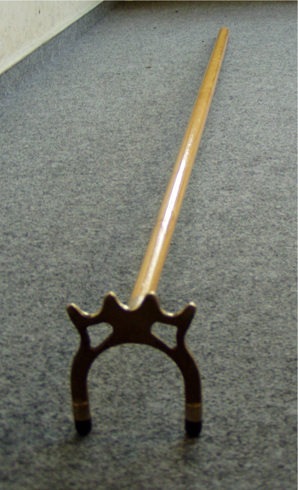 Ein erhöhtes Hilfsqueue